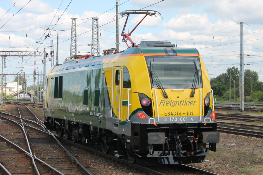 Lokomotywa elektryczna E6ACTd-101 z rodziny Newag Dragon należąca do Freightliner PL chwilę po odjeździe z peronu 3 stacji Warszawa Wschodnia, na której wcześniej przy peronie 1 była prezentowana, została oficjalnie przekazana oraz której nadano imię Ernesta Malinowskiego.